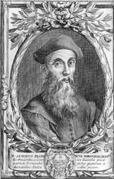 Marcantonio Flaminio (1498-1550)